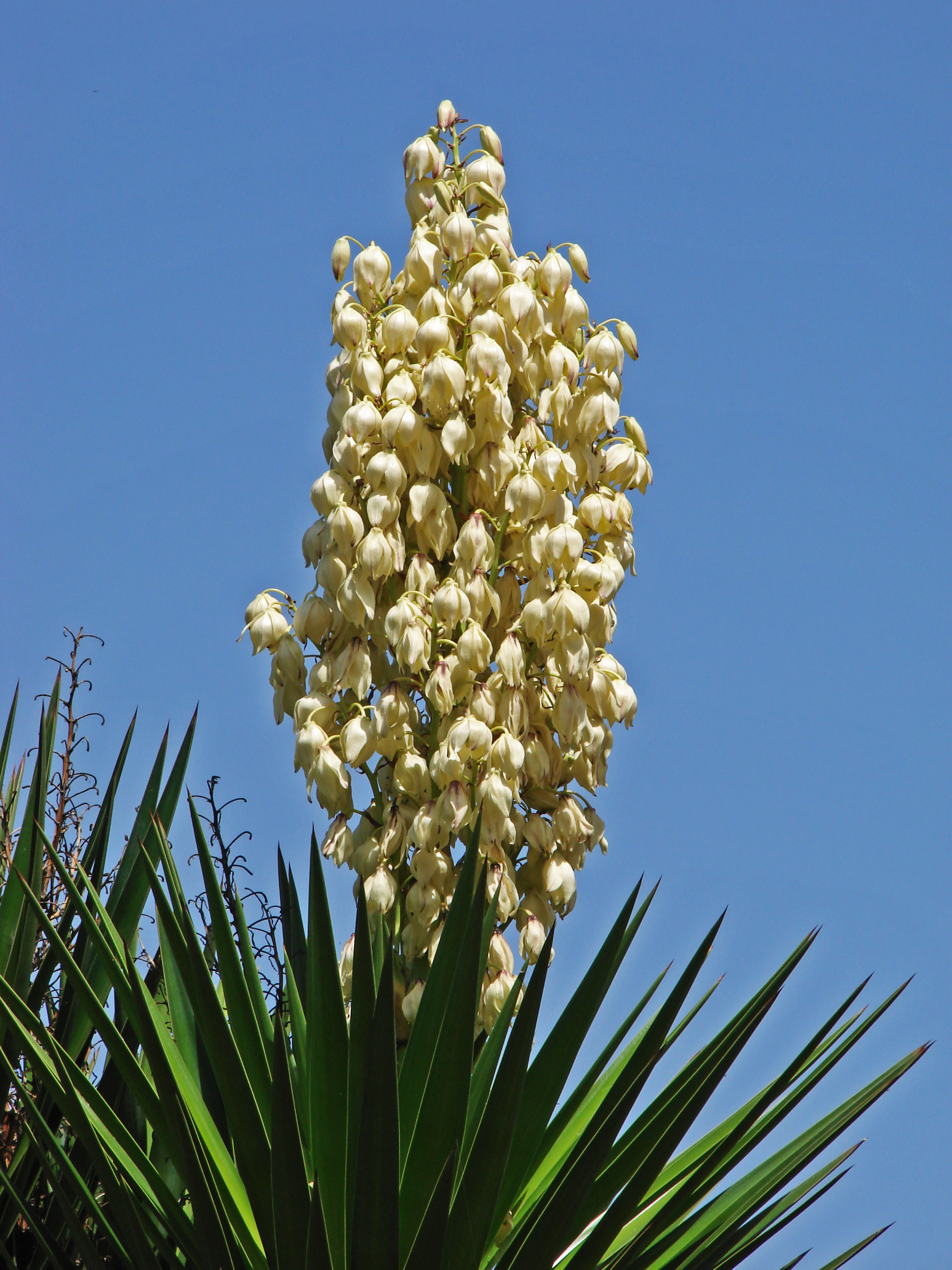 Yucca, Blütenstand